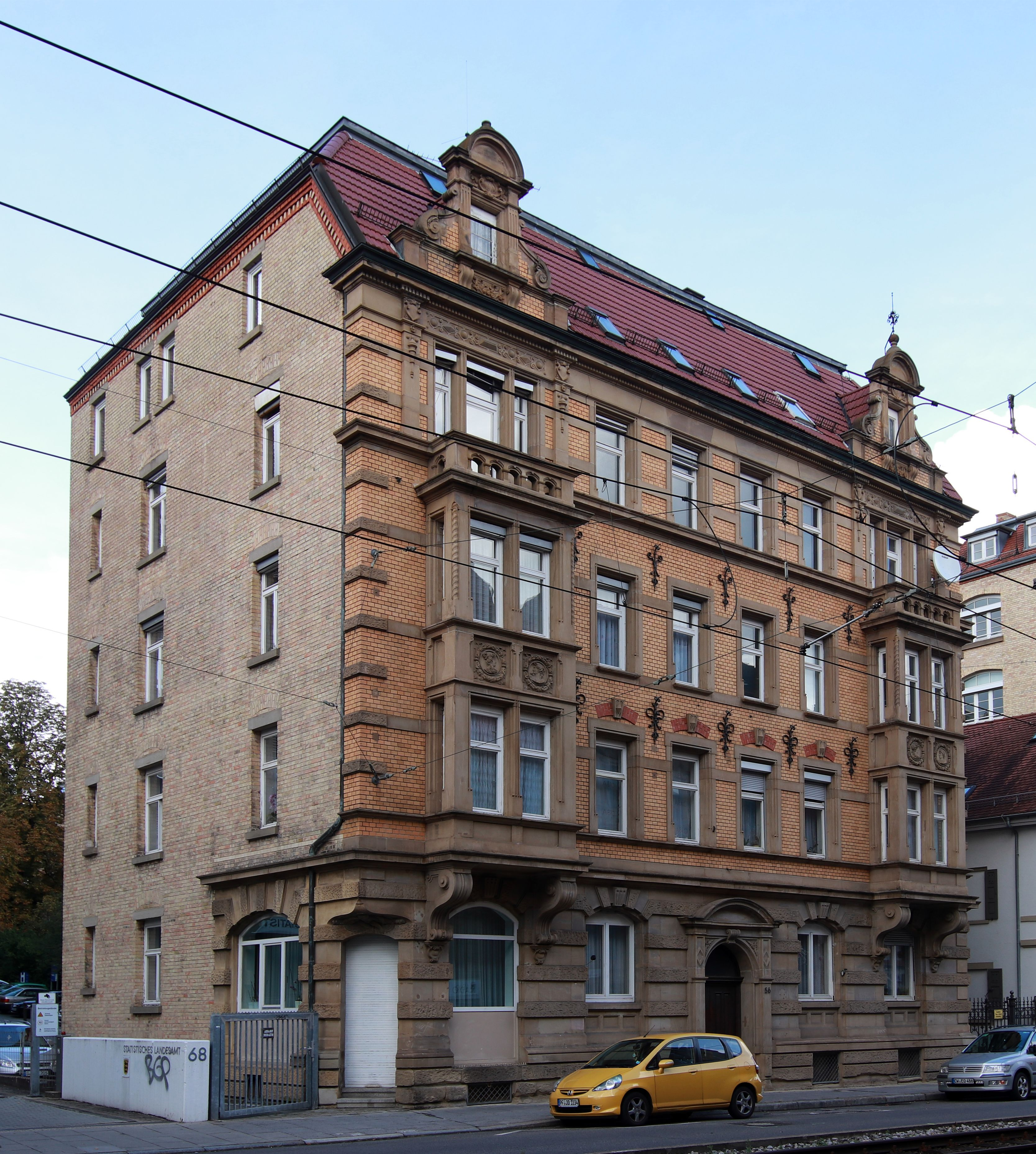 Mietshaus mit Ladenlokal Böblinger Straße 56 in Stuttgart. Erbaut 1885-1886 von Georg Friedrich Bihl und Alfred Woltz im Stil der Neorenaissance. Geschützt nach § 2 DSchG